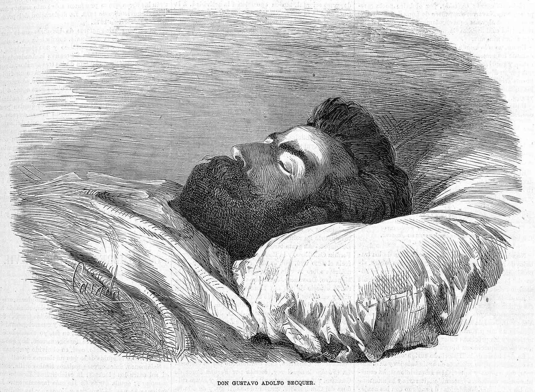 Gustavo Adolfo Bécquer en su lecho de muerte, en La Ilustración de Madrid.